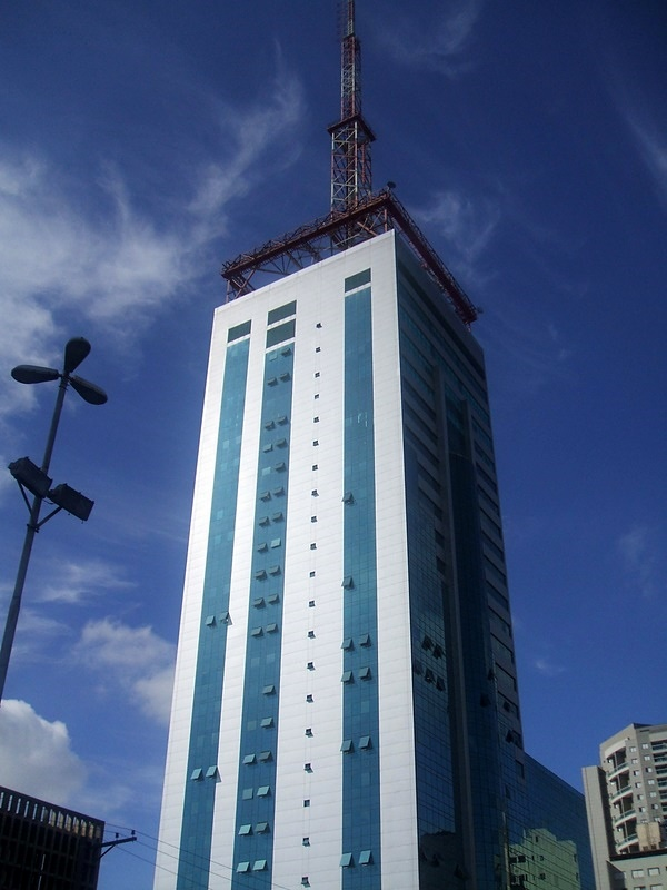 Universidade Paulista - Campus Paraíso - Cidade de São Paulo, Brasil.